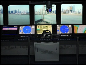 模拟驾驶室